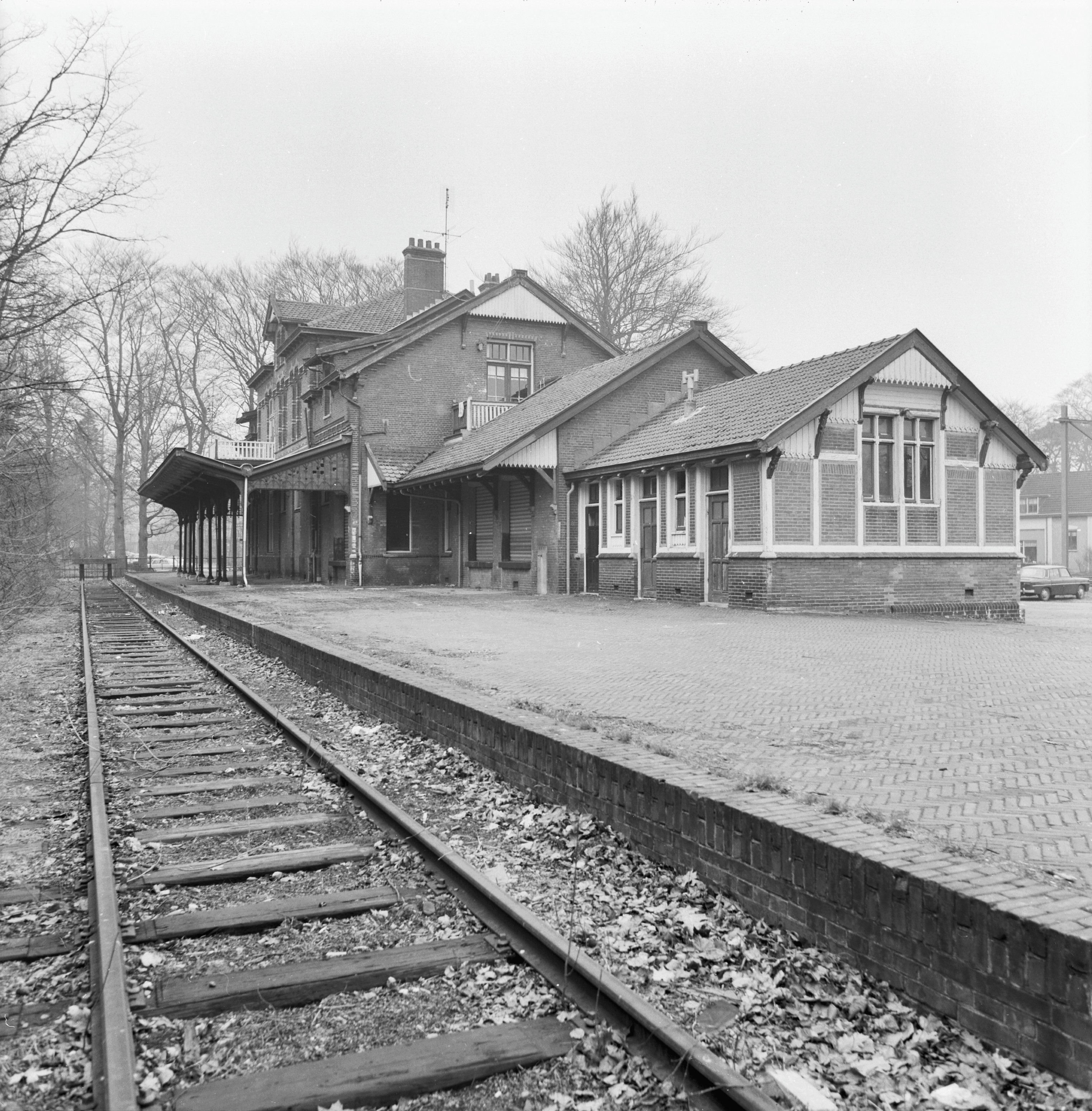 V.M..C.S. Station: achtergevel